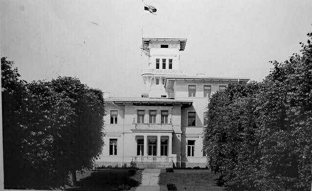 Oru loss 1930.-tel.